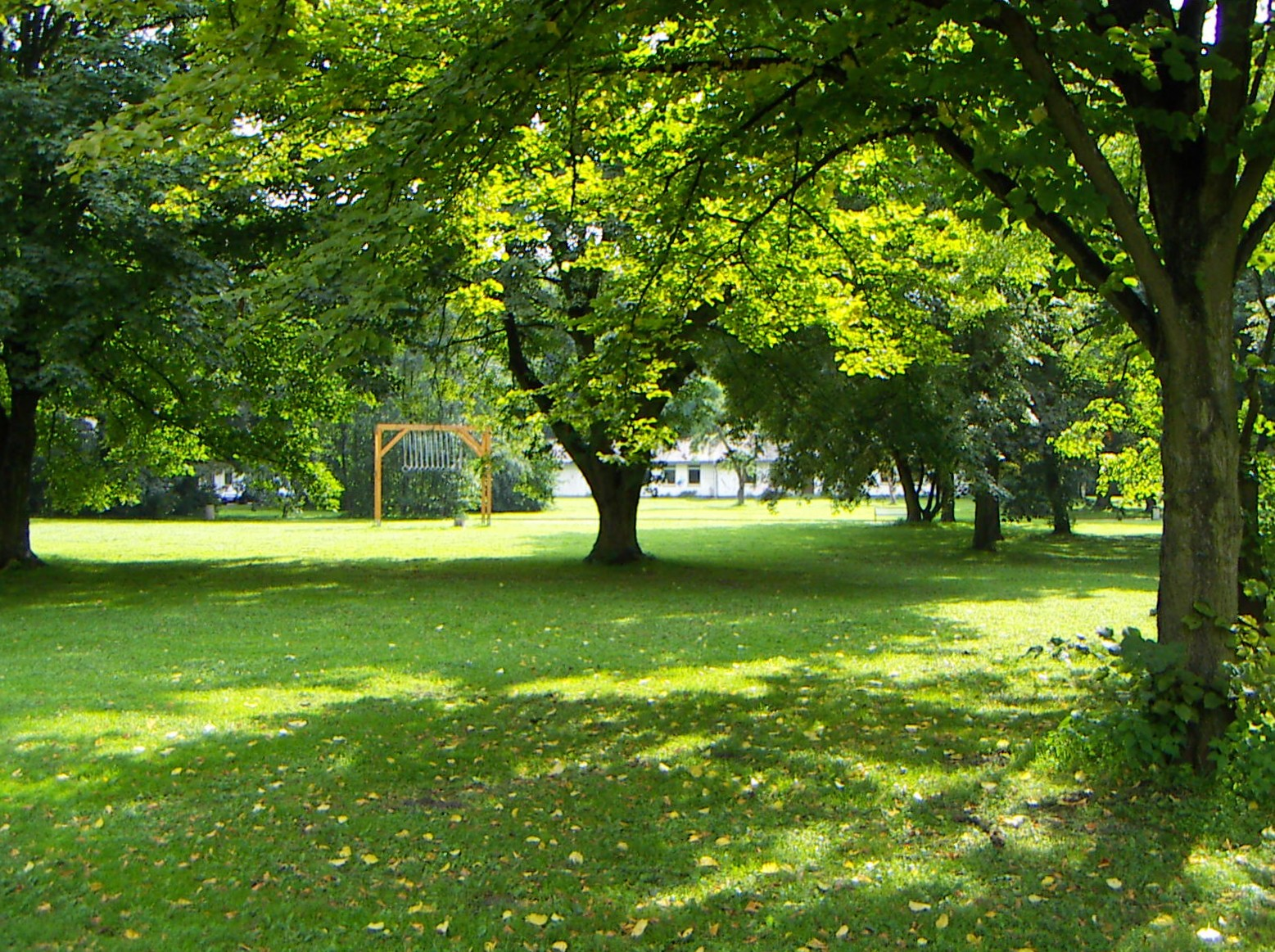 Park mit Blick auf die Brüterei der ehemaligen LVA in Unna-Königsborn